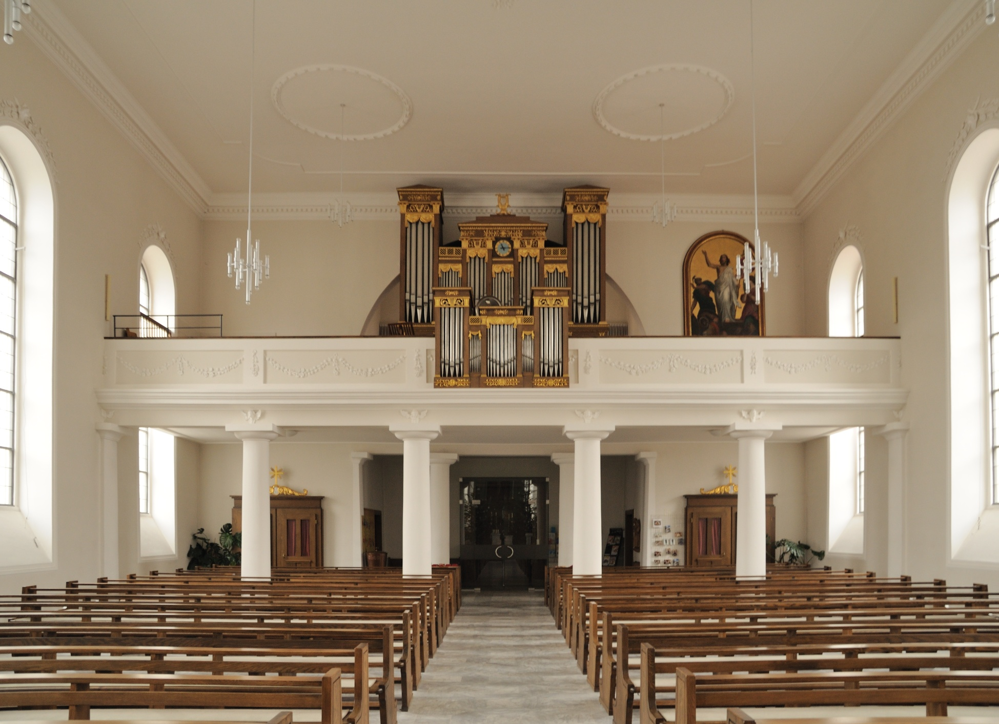 Fridolinskirche in Lörrach Stetten: Empore mit Orgel und Rückpositiv